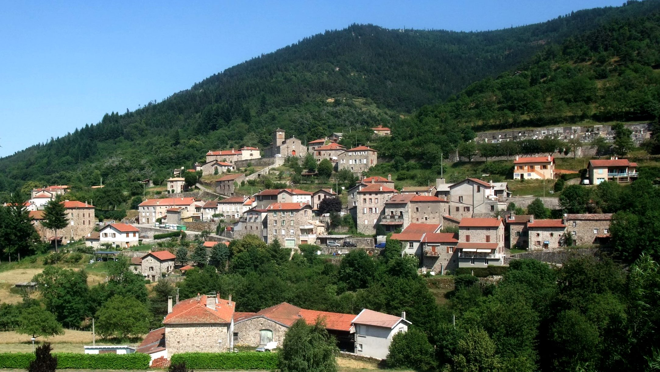 Saint-Julien-Vocance vue générale